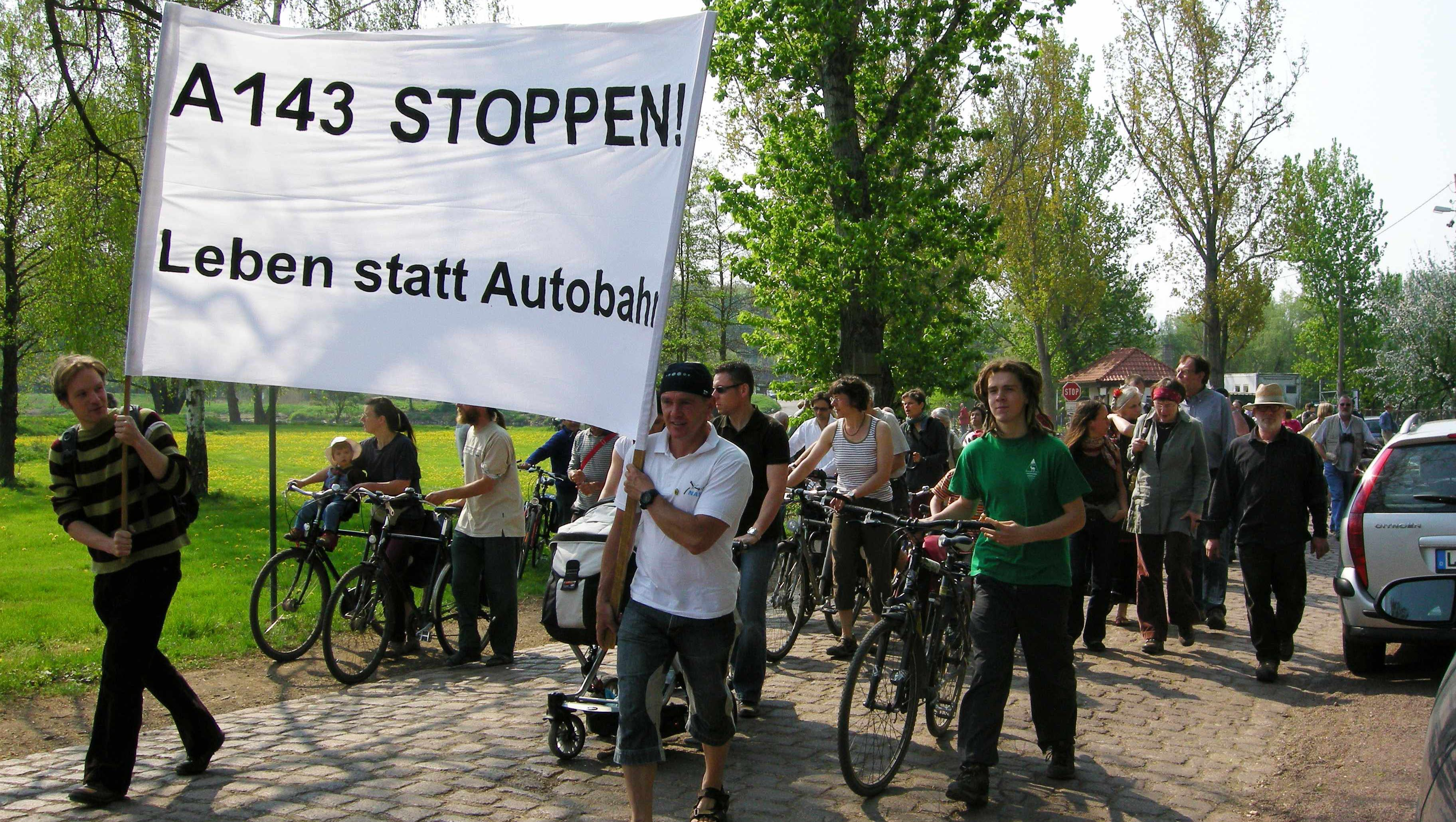 Ostermarsch im April 2011 für den Naturschutz, gegen die A-143